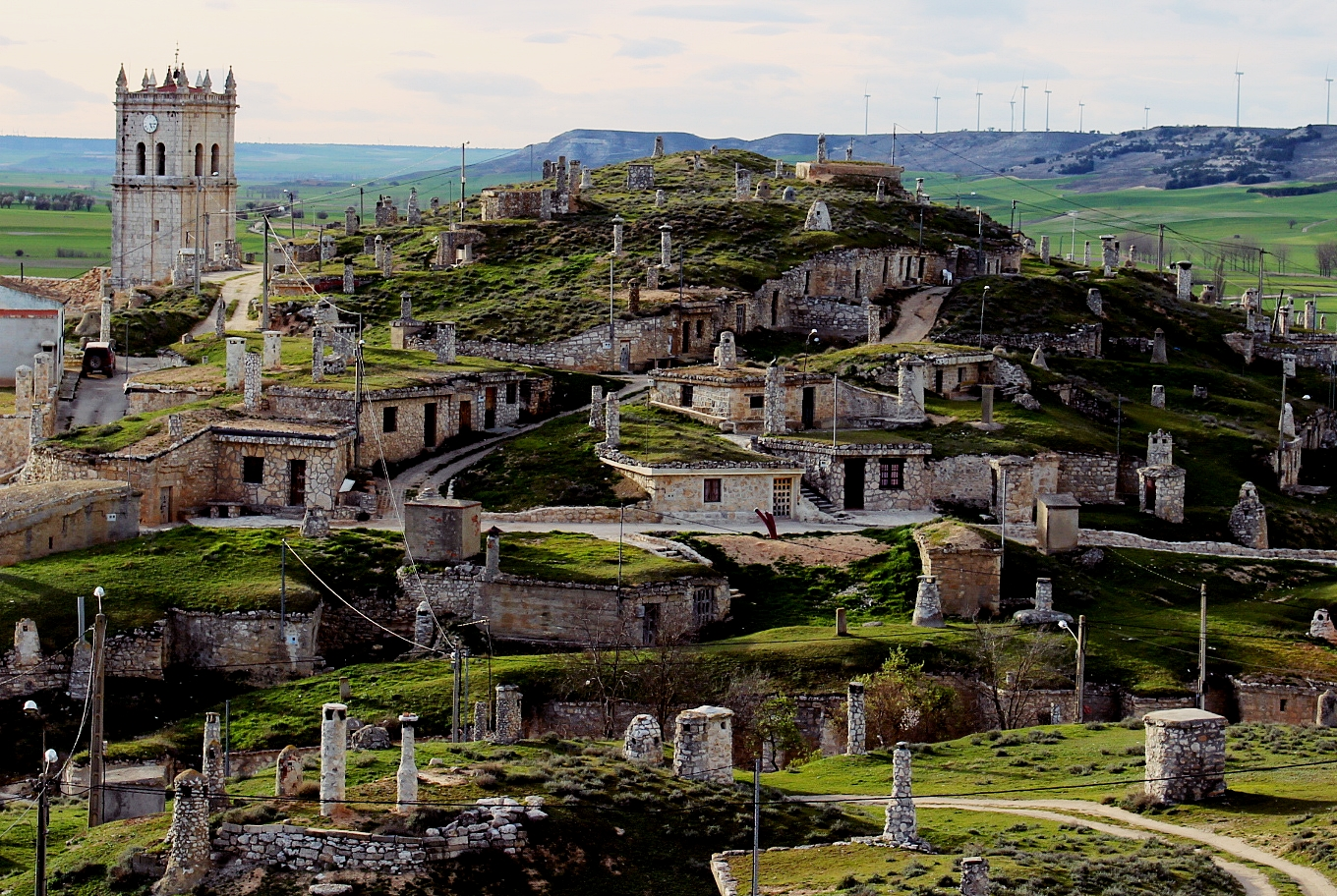 Panorámica de las bodegas de Baltanás